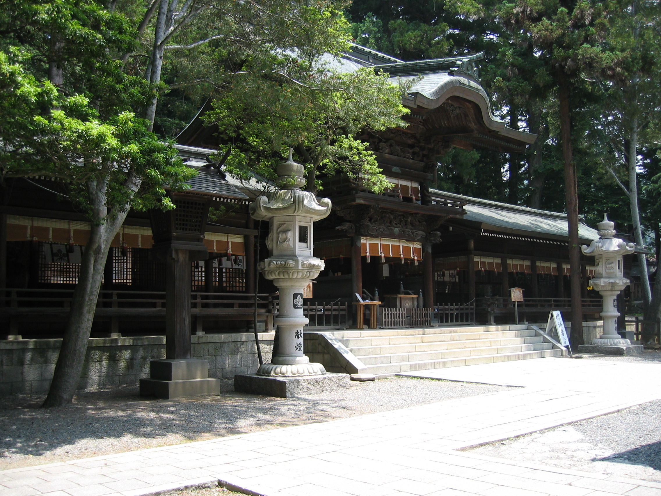 Suwa Taisha Shimosha Akimiya Heihaiden (諏訪大社下社秋宮弊拝殿)